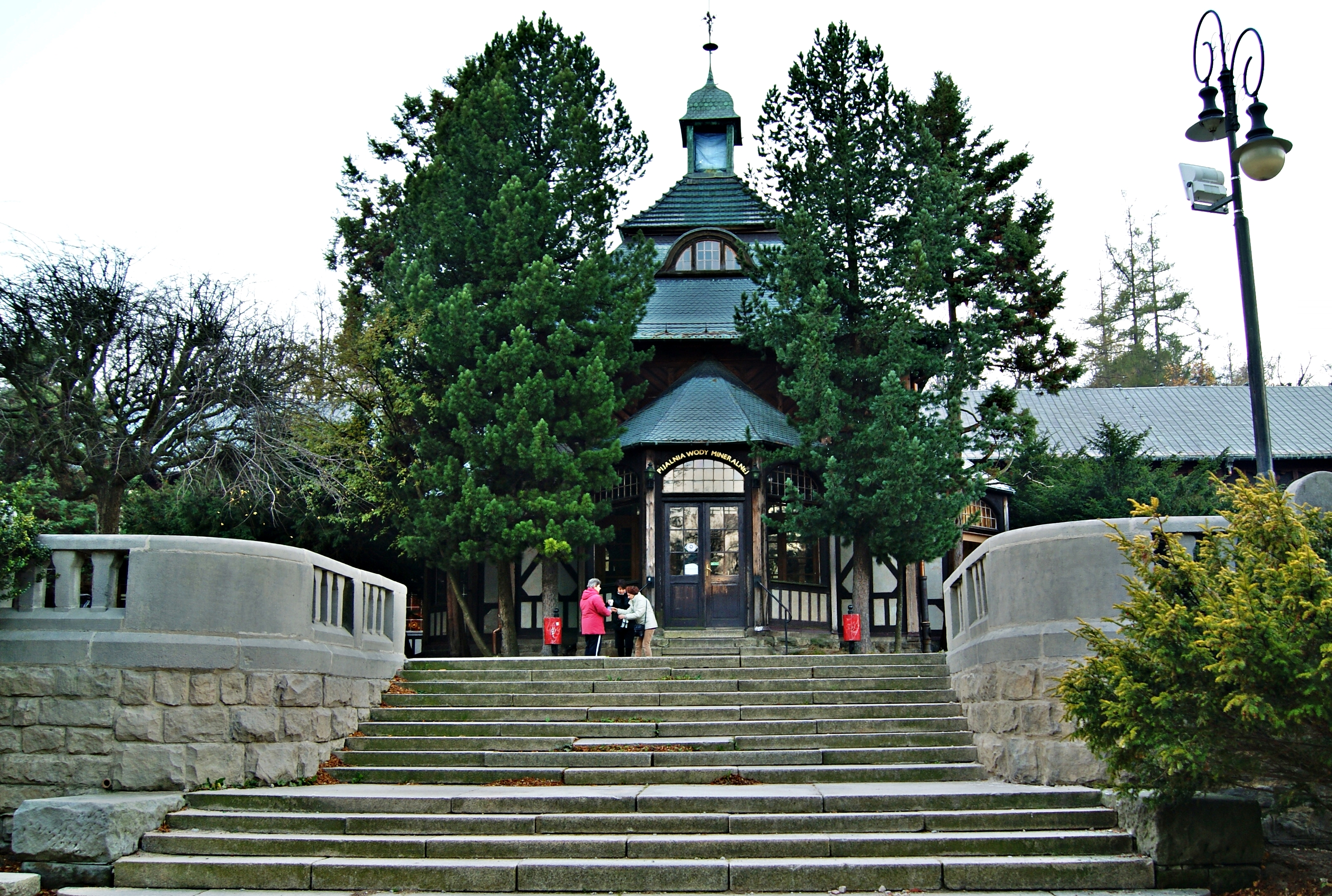 Świeradów-Zdrój - pijalnia wód mineralnych w Domu Zdrojowym (zabytek 351/903/J z 14.01.88)